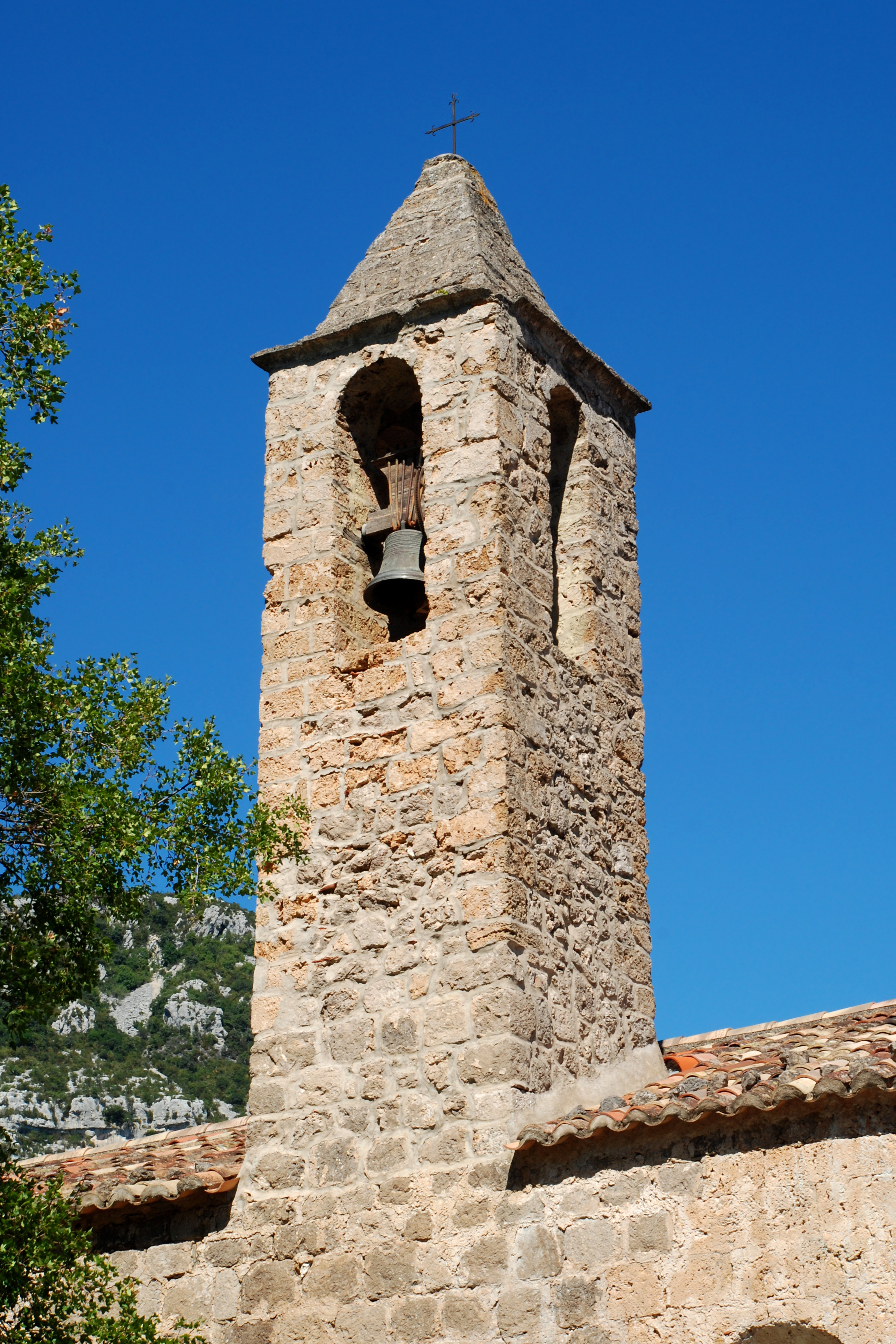 France - Hérault - Église Notre-Dame de Pégairolles-de-Buèges